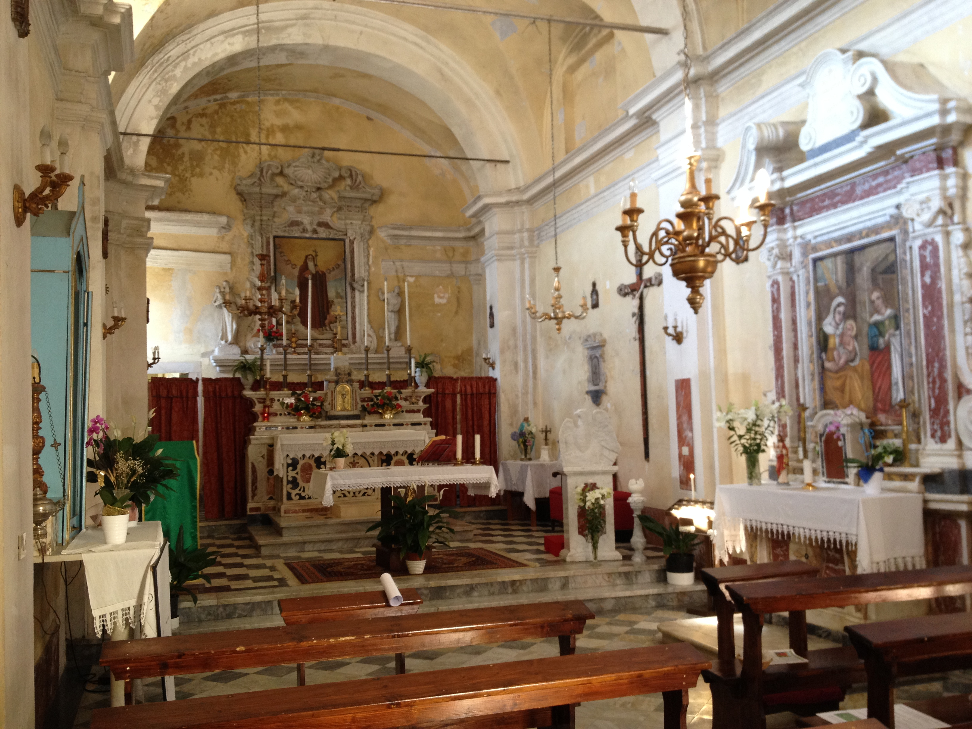 sculpture church